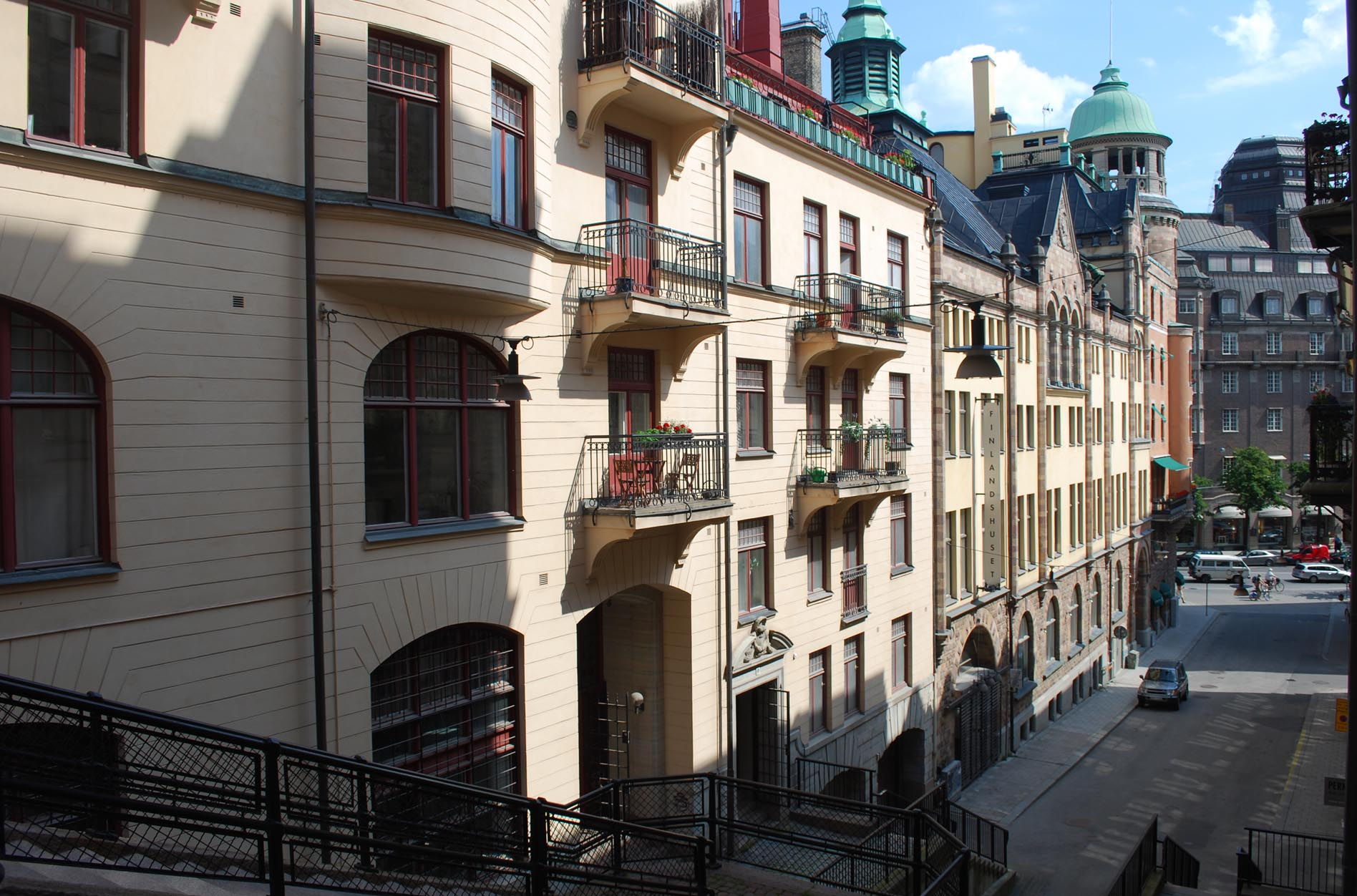 Snickarbacken 2-10 i Stockholm, sedd från Regeringsgatan. I fonden Birger Jarlsgatan.